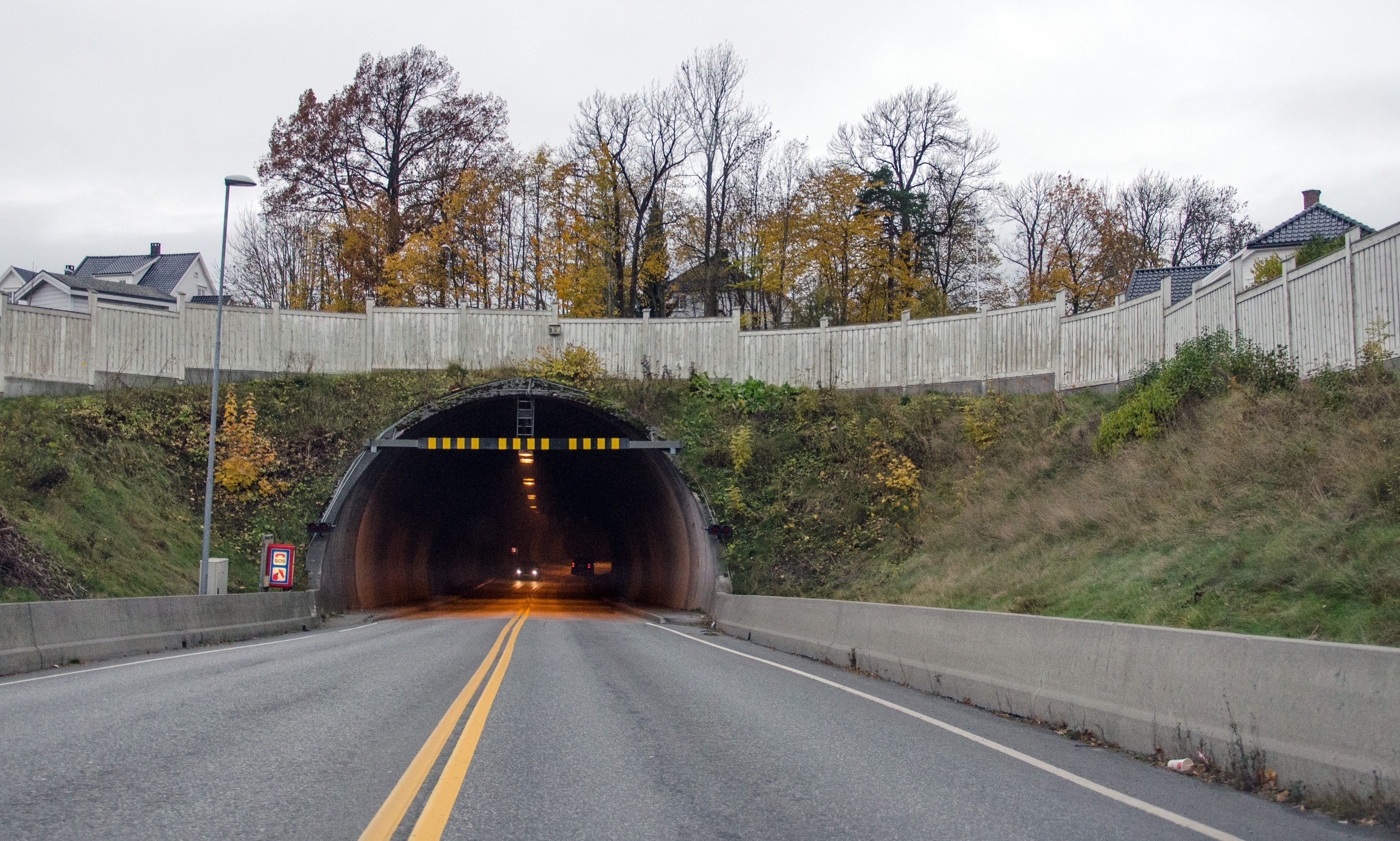 Porsgrunnstunnelen